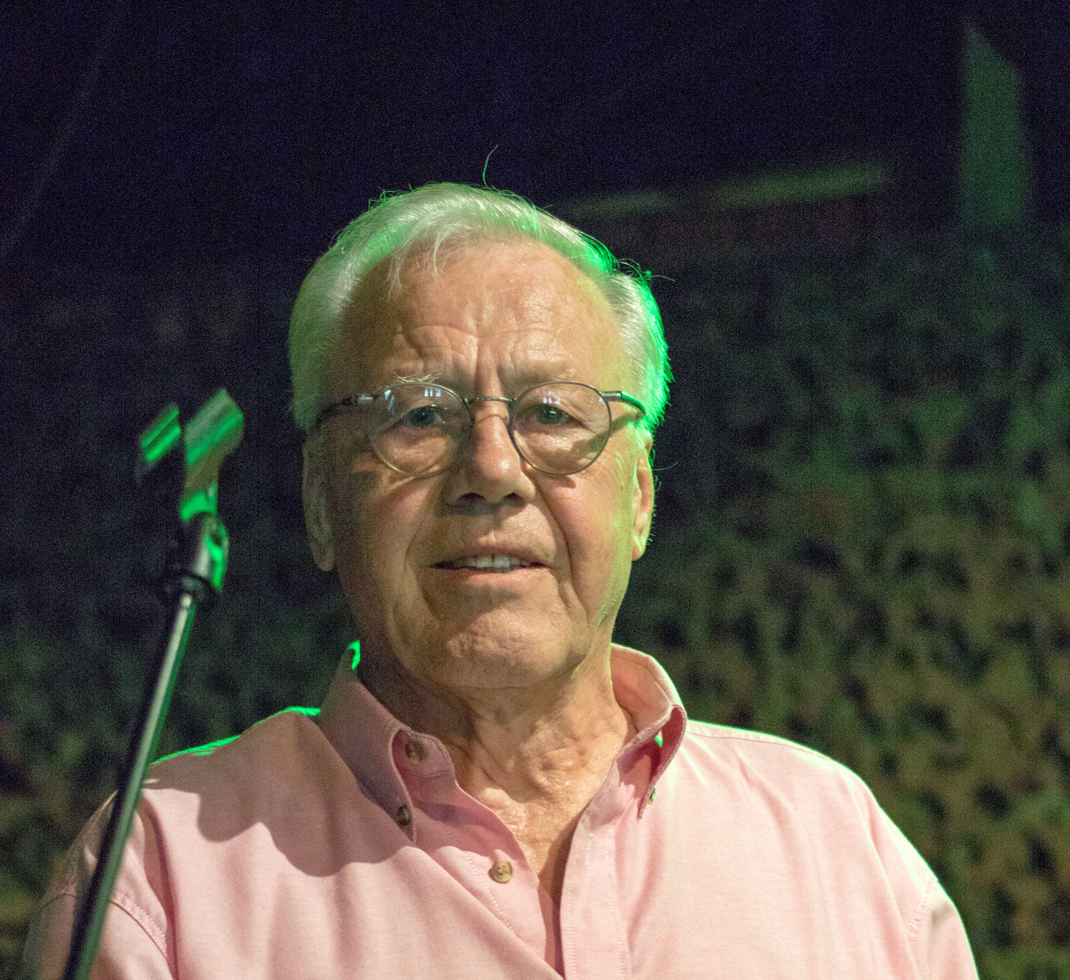 Ahti Lampi, suomalainen laulaja